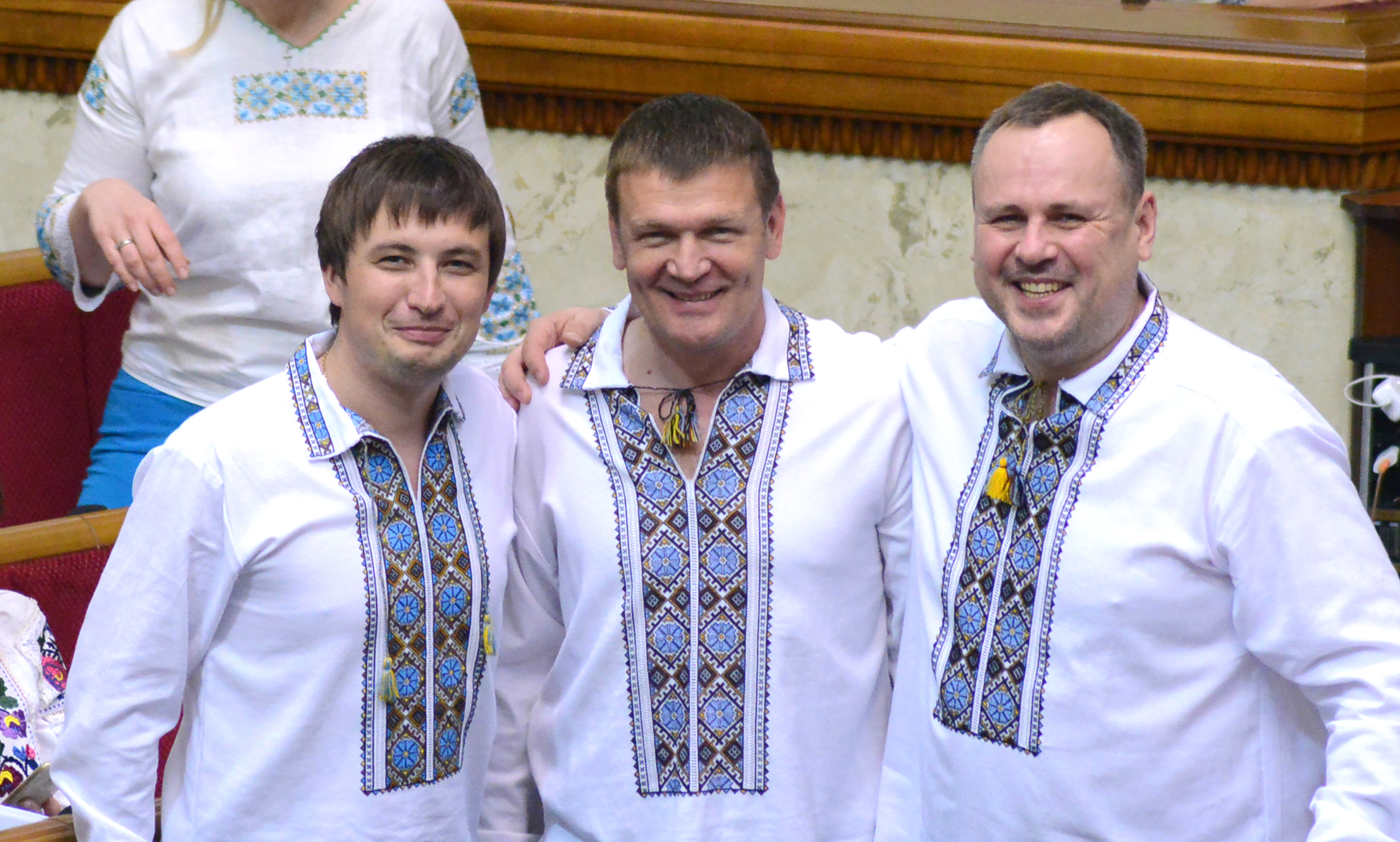 ВЕРХОВНАЯ РАДА УКРАИНЫ 2016 , фото Вадим Чуприна